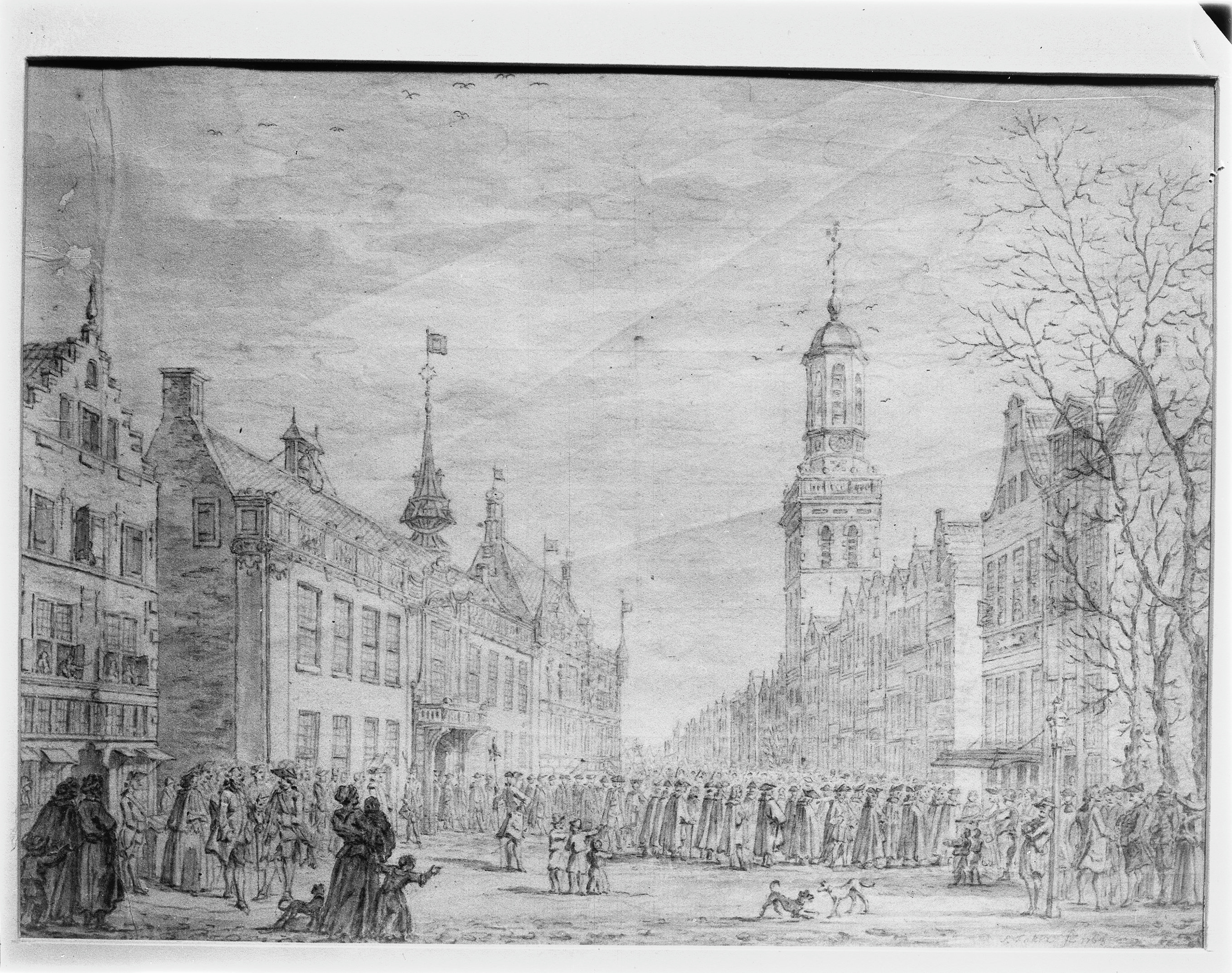 Raadhuis: en kerk reproductie door Simon Fokke 1712-1784